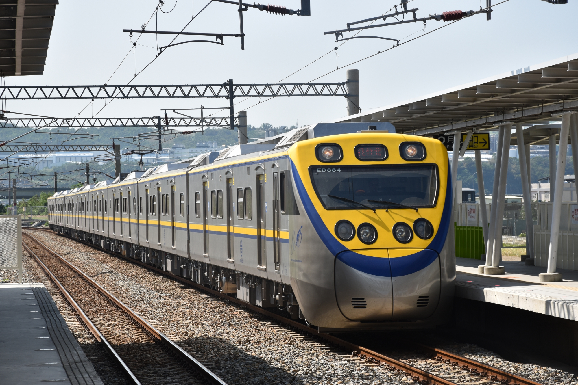 臺灣鐵路管理局電聯車EMU883+884試運轉，通過豐富車站。